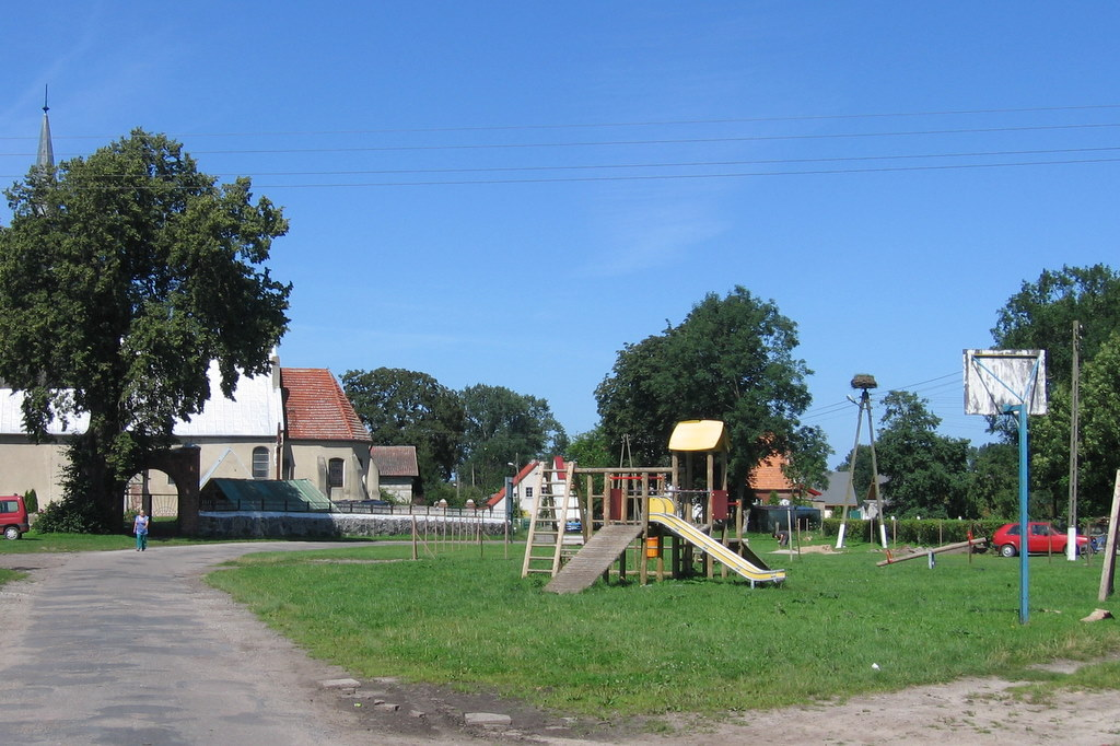 Centrum wsi Roby w woj. zachodniopomorskim